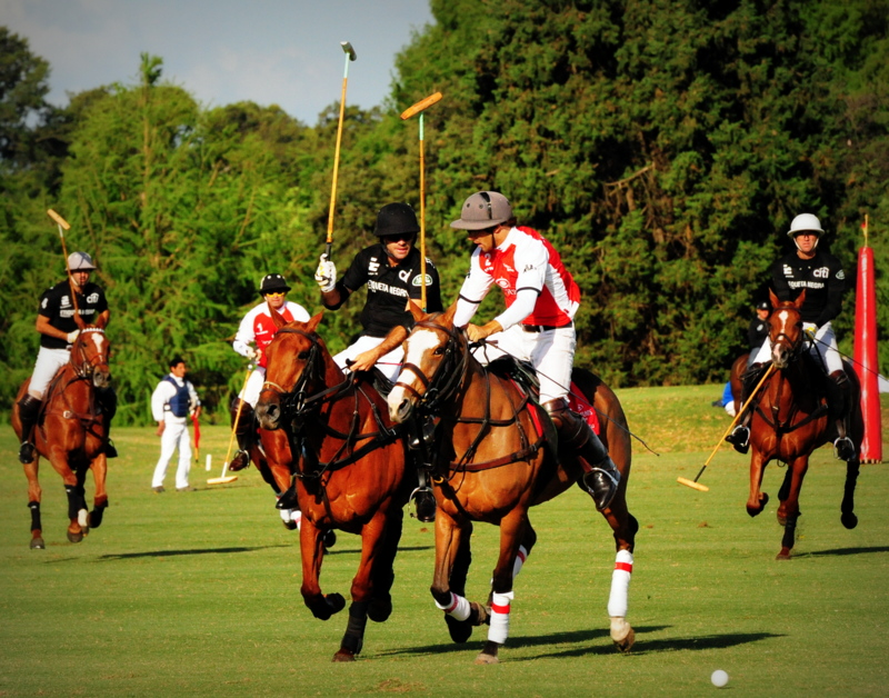 117th Hurlingham Club Open Championship, Argentina / 117° Abierto de Hurlingham YPF